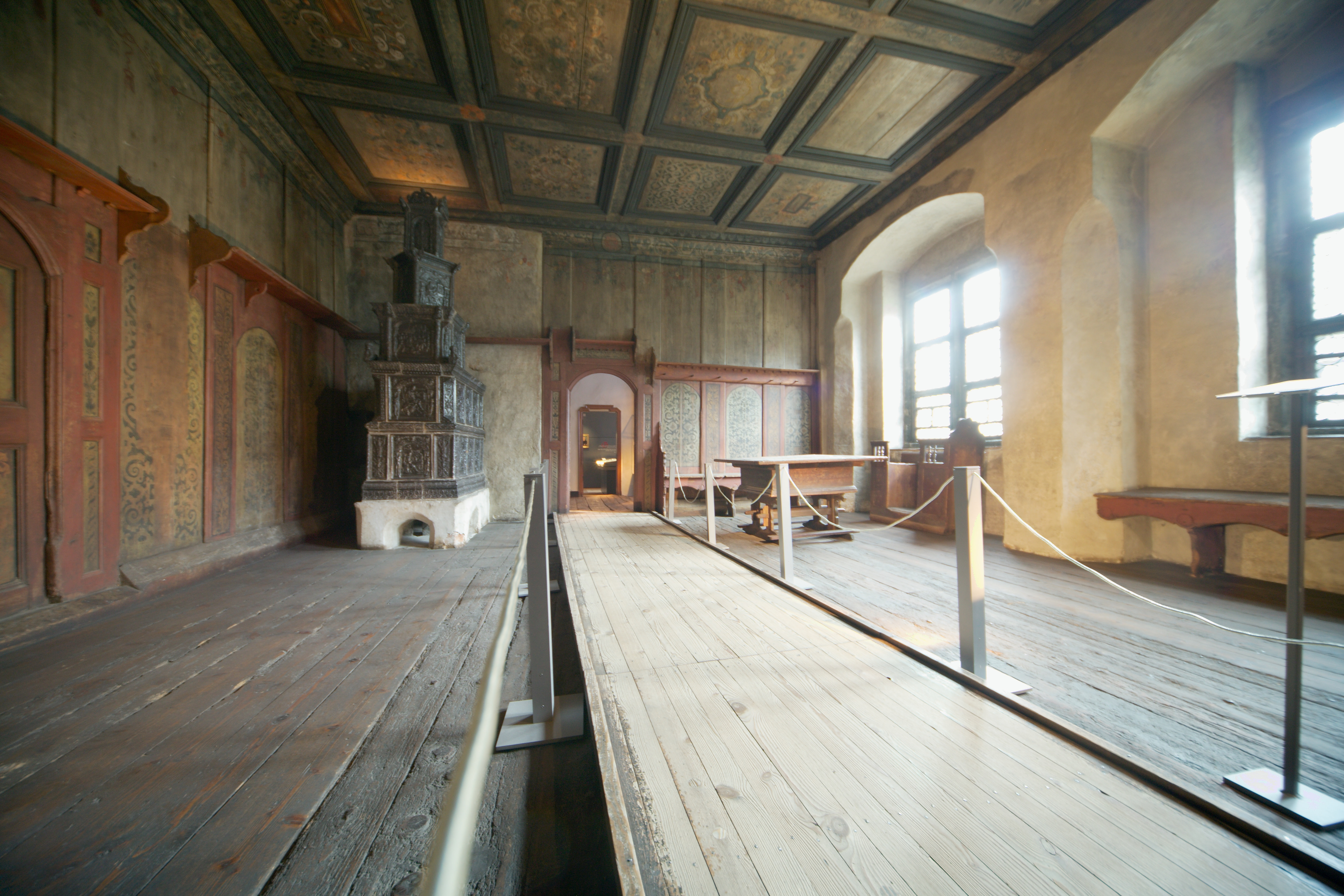 Lutherhaus